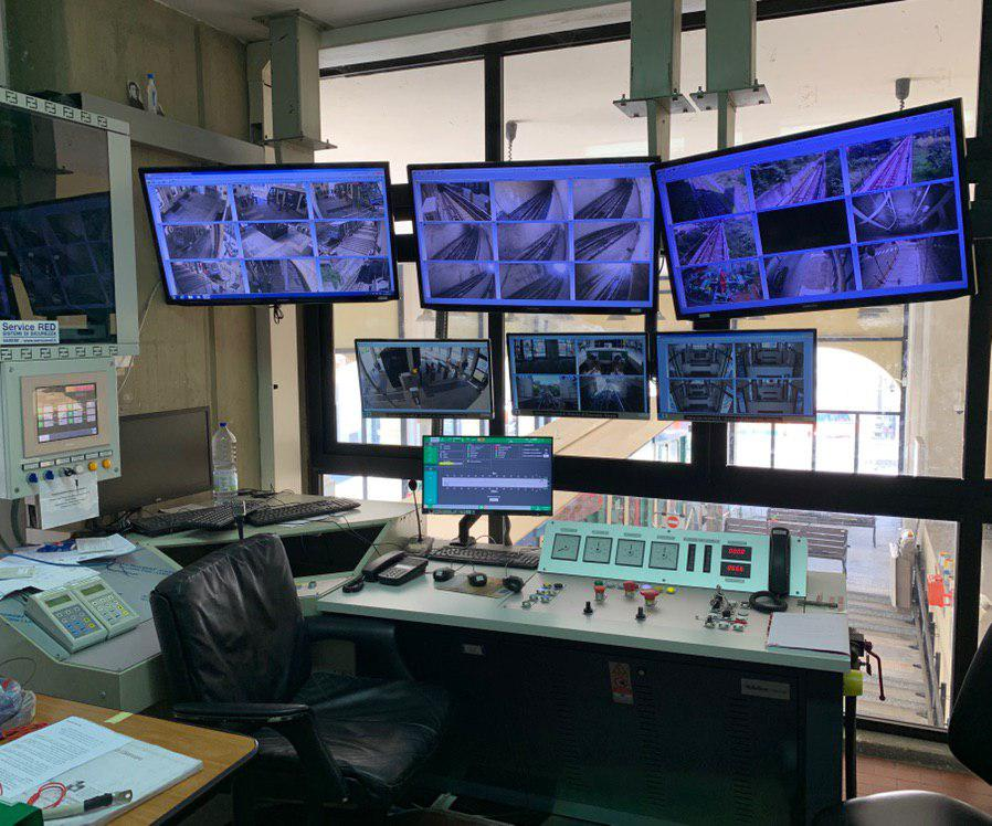 Nuovo Pulpito di comando posto nella sala Macchine/regia della funicolare di Catanzaro